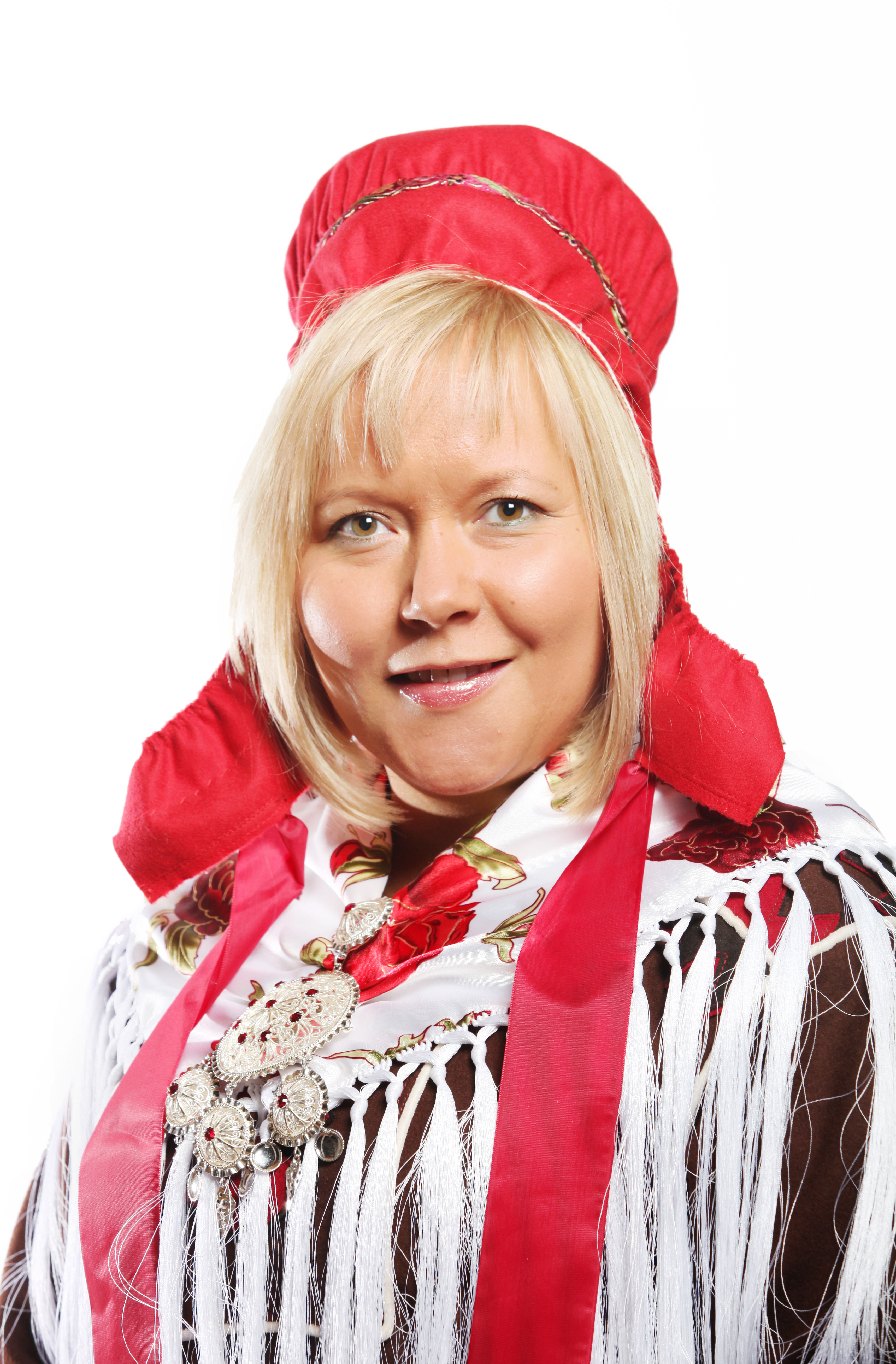 Medlem av plenumsledelsen, næring- og kulturkomitéen og nestleder for kontrollutvalget. Foto: Kenneth Hætta / Sametinget.